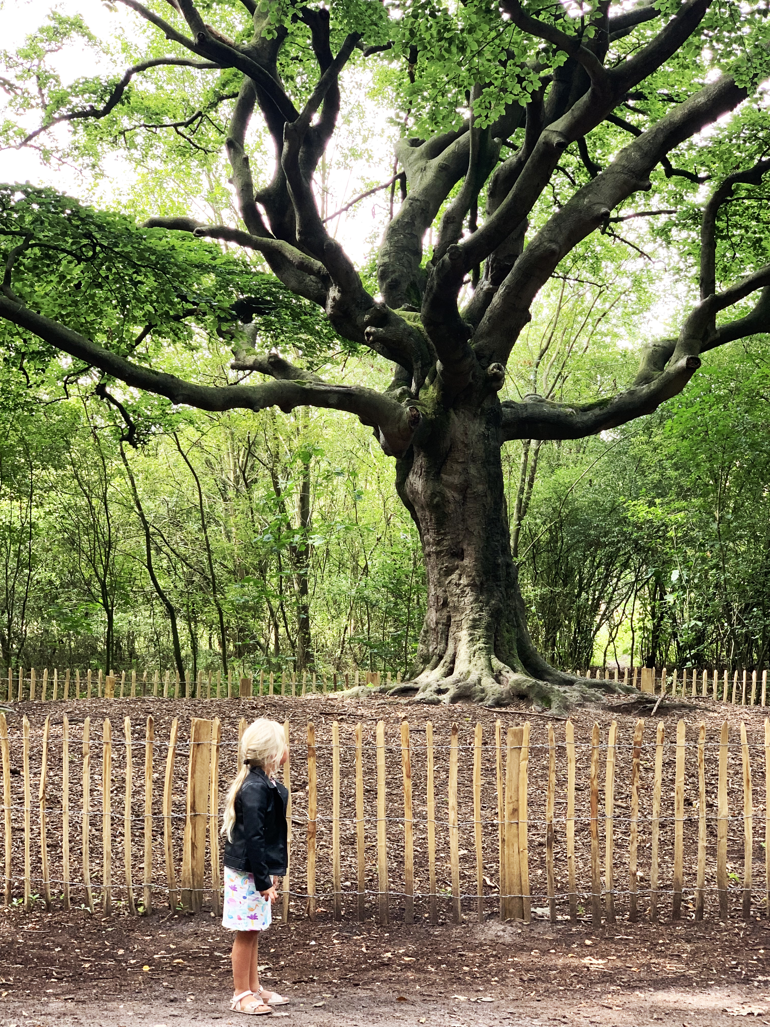 De Heksenboom in Bladel Brabant Nederland